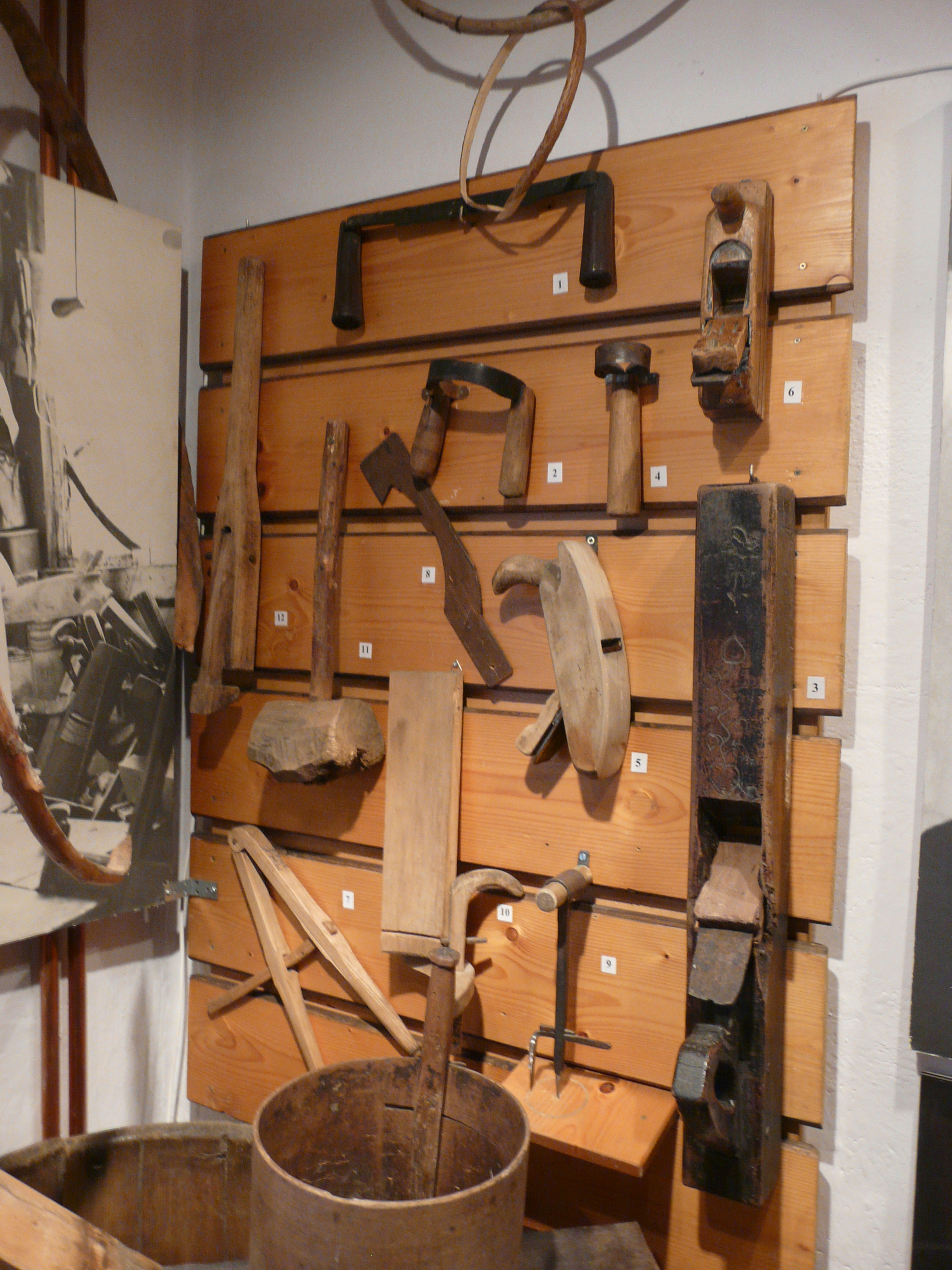 Beskid Museum in Wisła See Image:Beskid Museum - exhibits 39 - desc.JPG for description